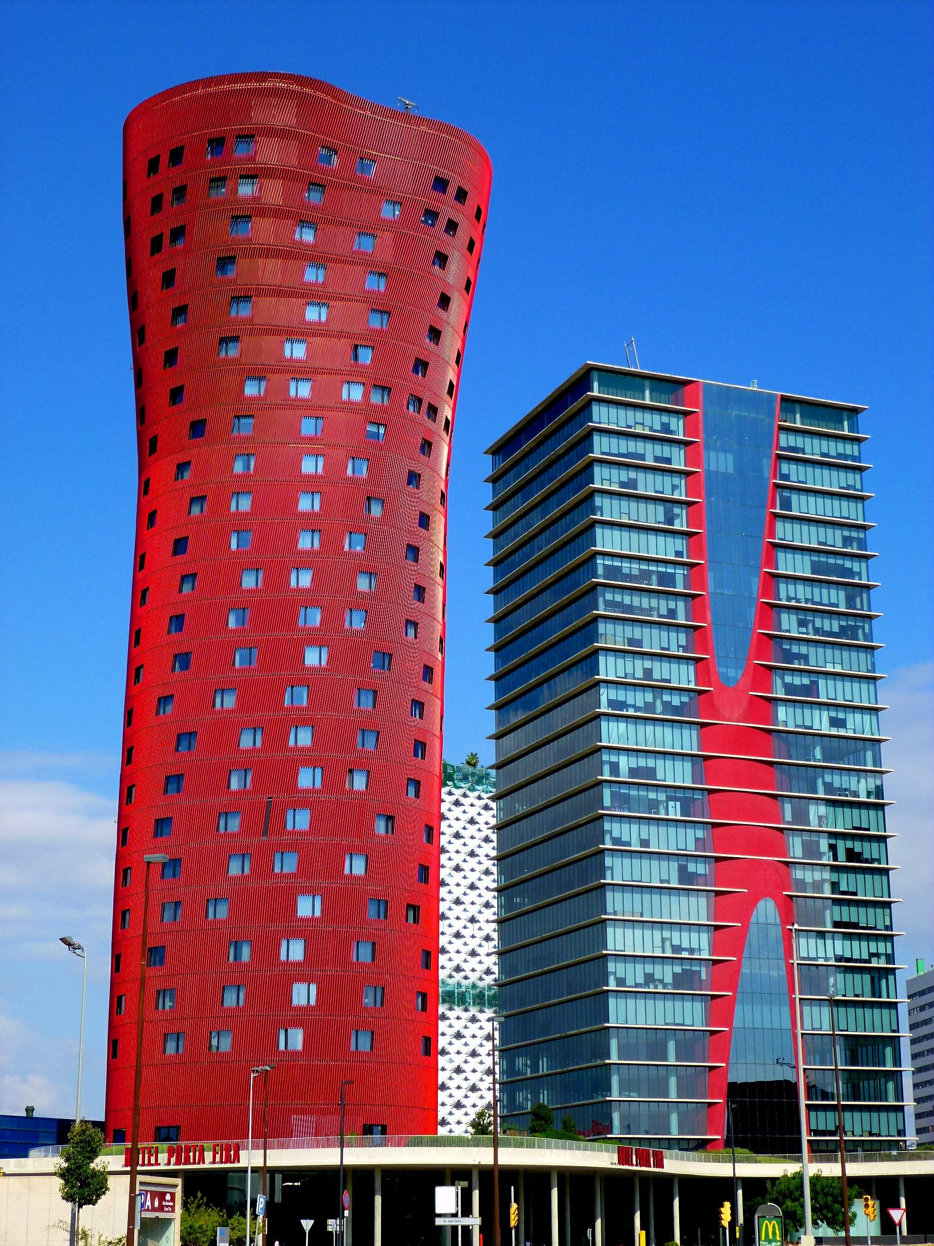 Torres de Toyo Ito (Torres Porta Fira), consistentes en el Hotel Porta Fira y la Torre Realia BCN, emplazadas en la Plaza de Europa de Hospitalet de Llobregat (Barcelona)